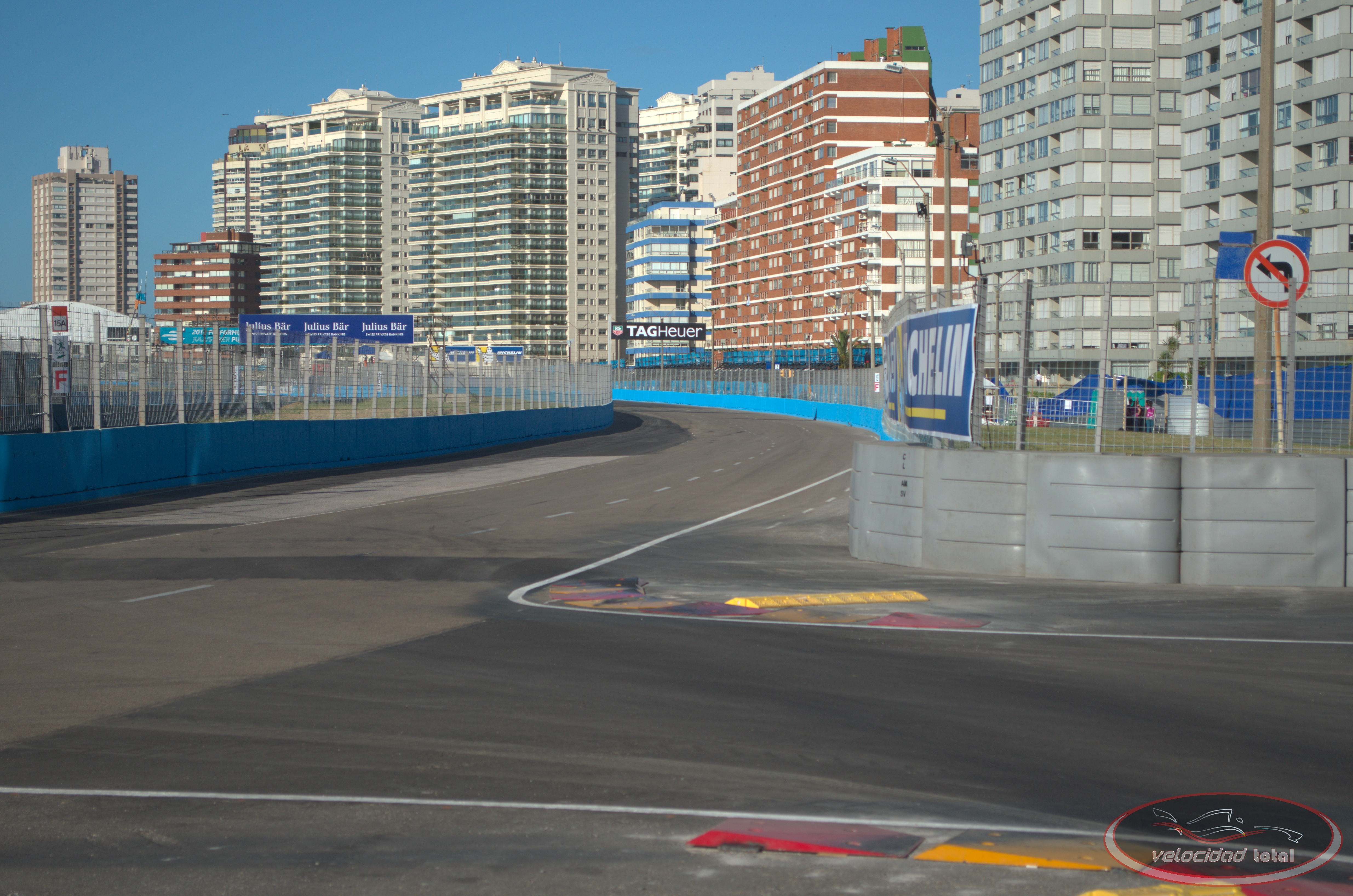 Solo se permite el uso de esta imagen mencionando a Velocidad Total como su autor. Imagen del Punta del Este ePrix de 2014.